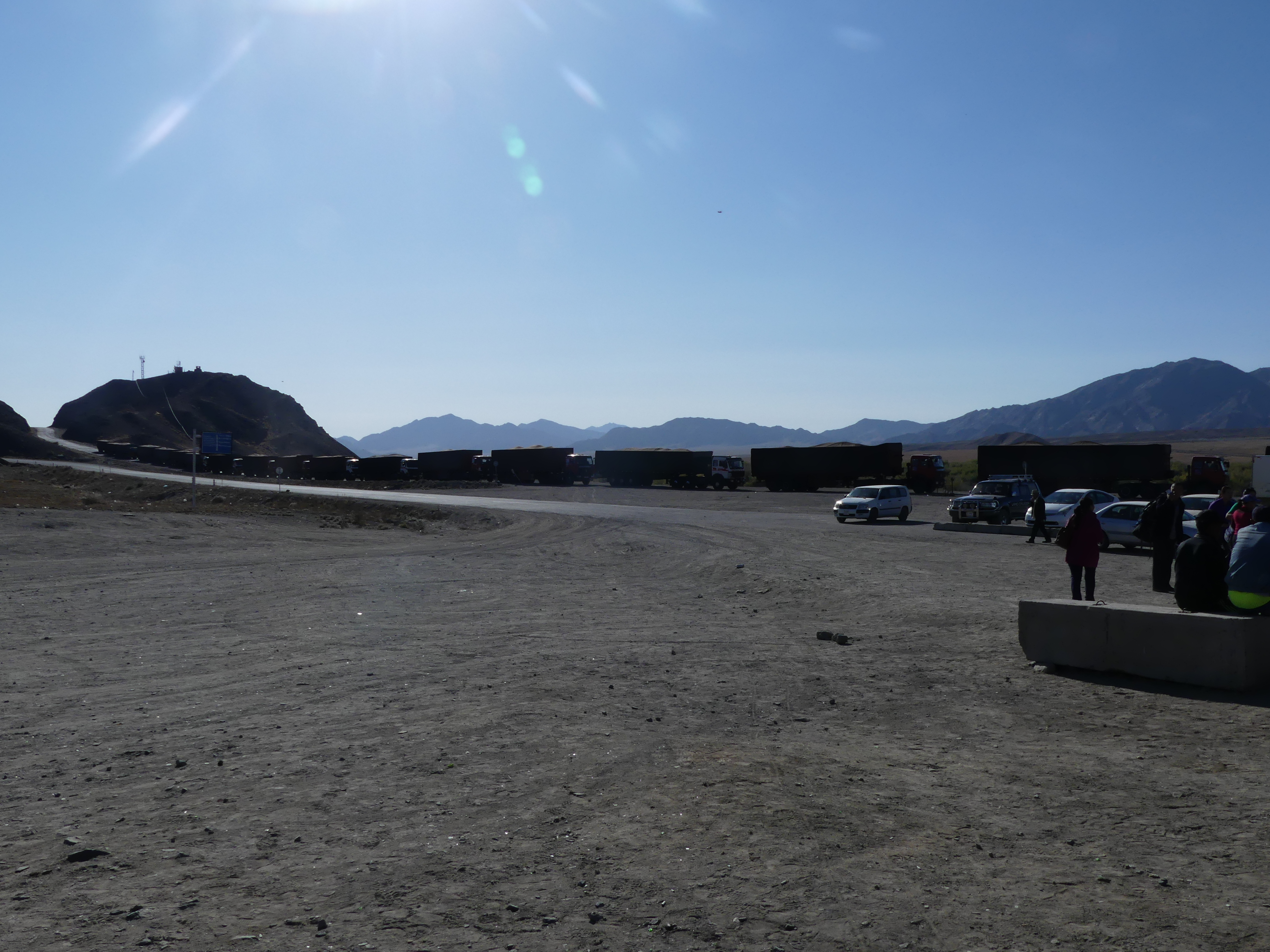 Route asphaltée à la frontière chinoise, près de Bulgan (Burenkhairkhan, Mongolie), de nombreux camions attendent